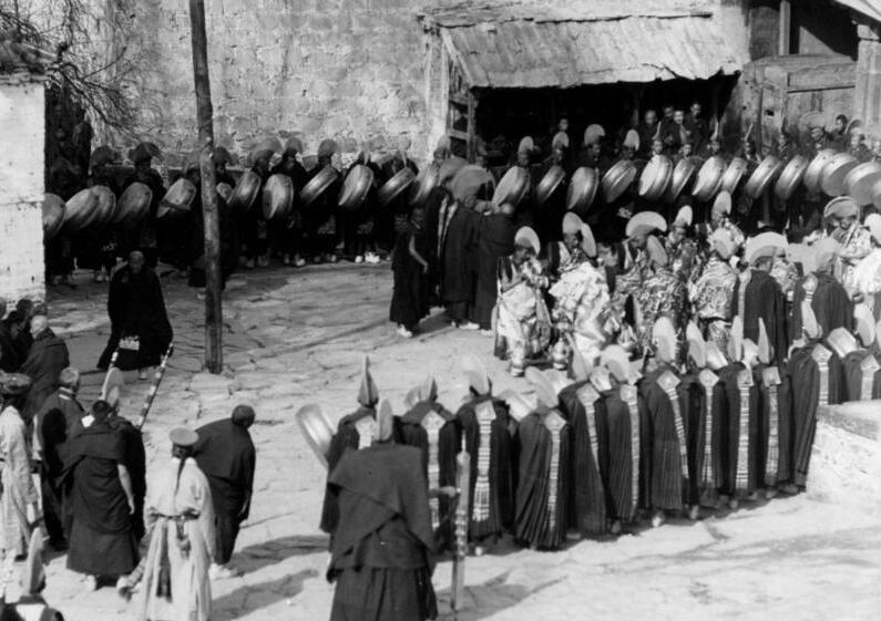 Lhasa, Festhandlungen: Tänze, Paraden, Zuschauer anlässlich des letzten Tages des Neujahrsfestes (Orakel)